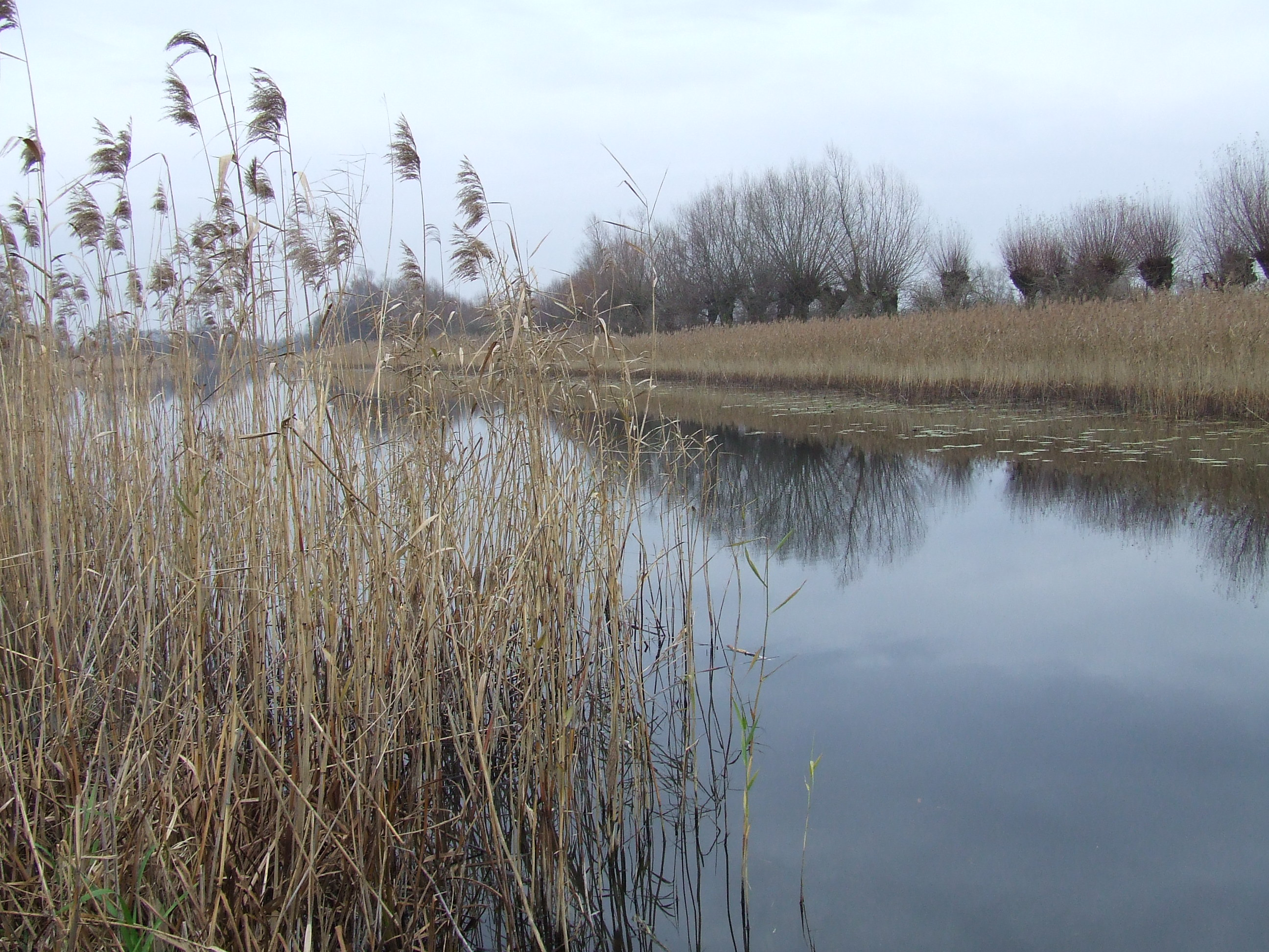 Jezioro Kiełpińskie, Kiełpin, Gmina Łomianki